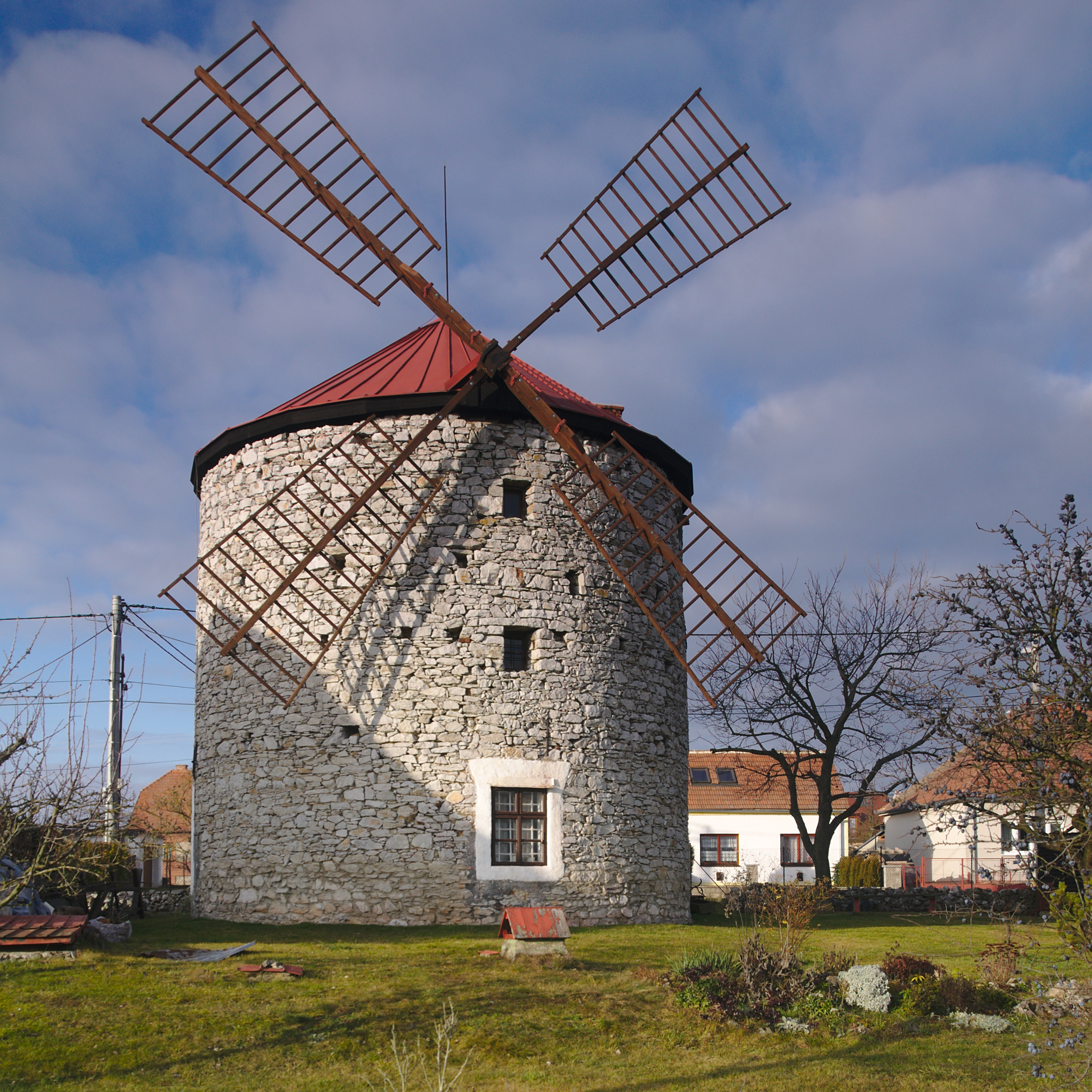 Větrný mlýn, Ostrov u Macochy, okres Blansko